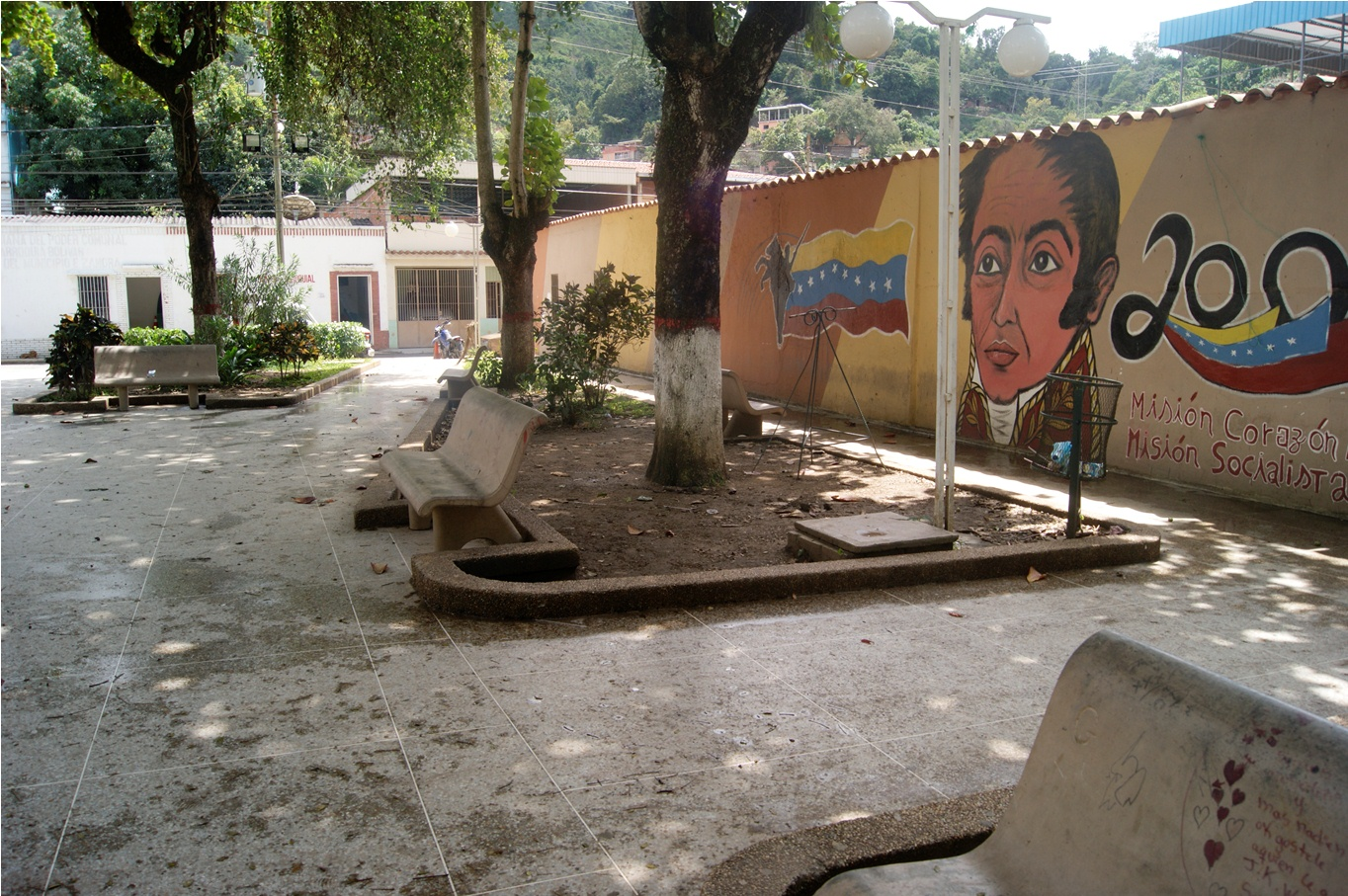 Plaza 19 de Abril, ubicada en la población de Araira, Municipio Zamora, Estado Miranda, Venezuela